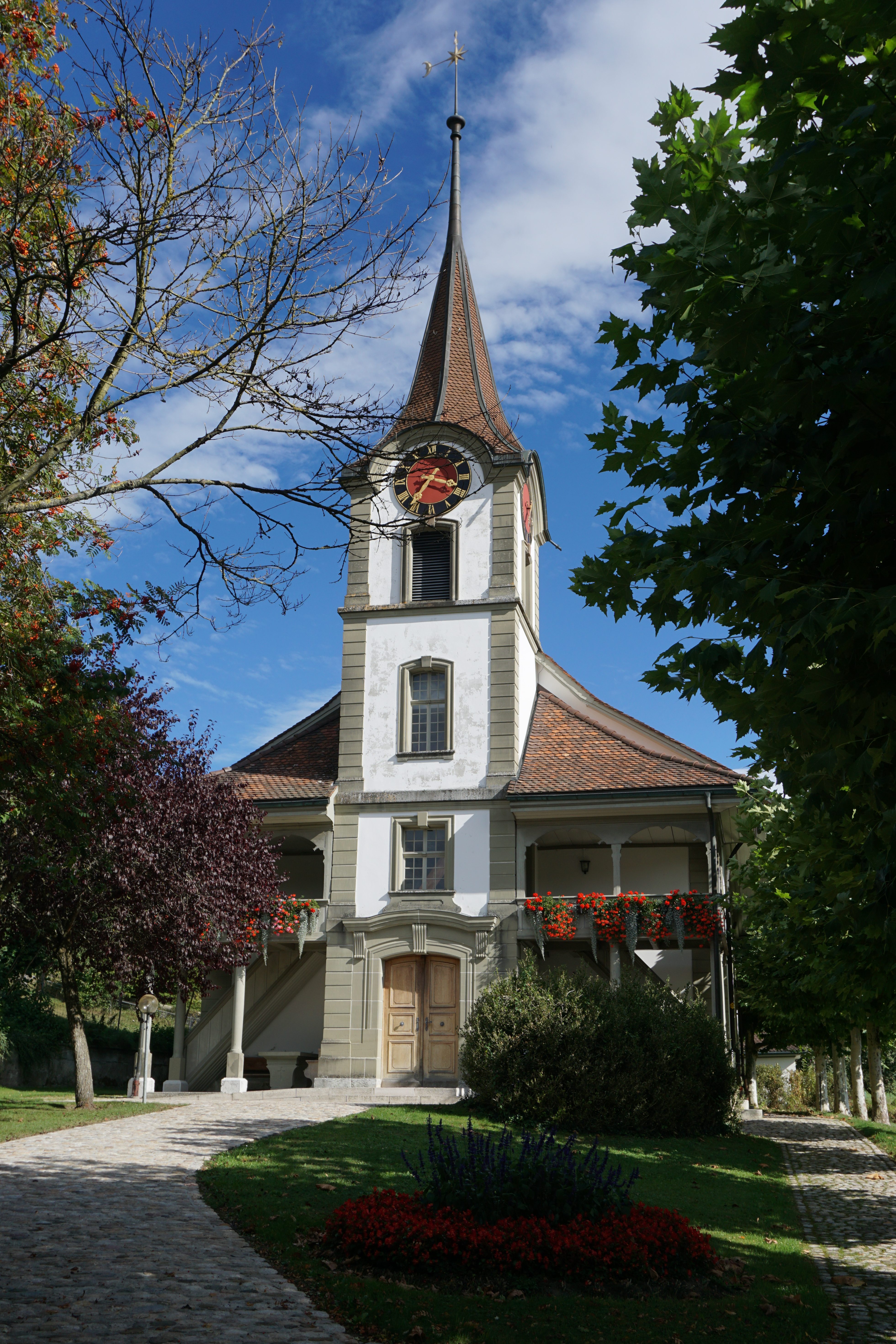 r. Kirche Turmseite